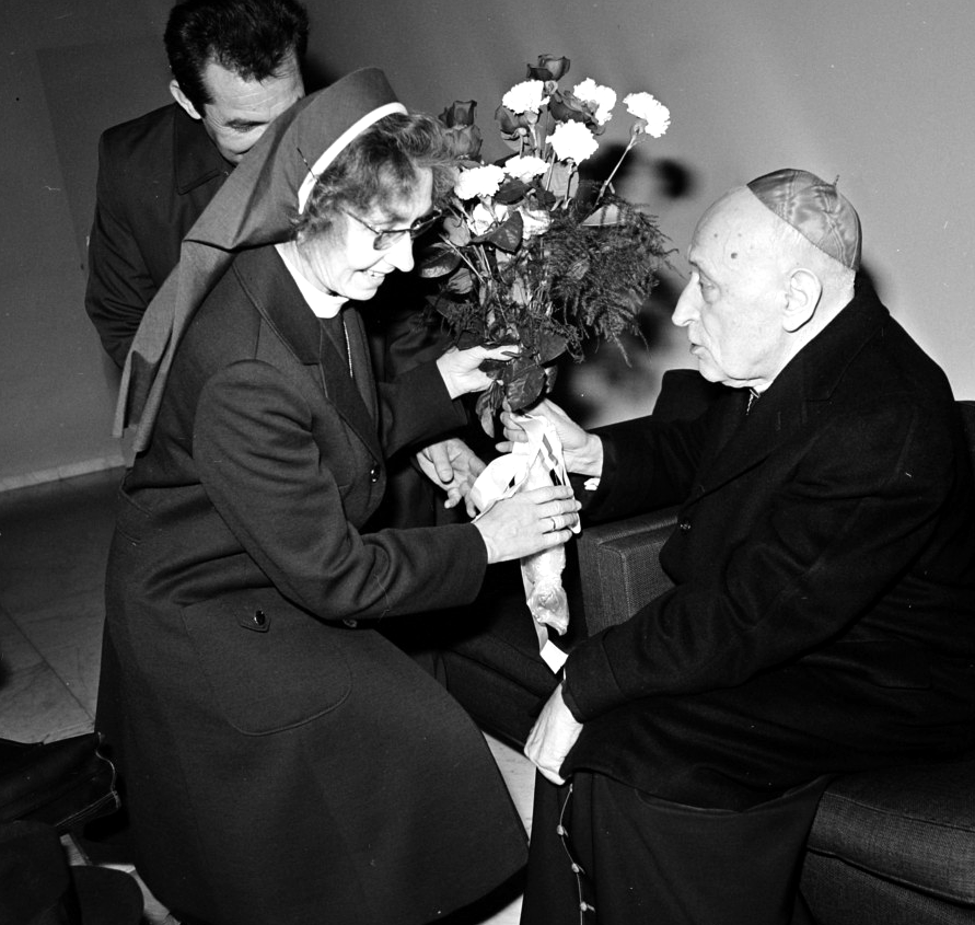 Kardinaal Mindszenty even op Schiphol, kardinaal Mindszenty krijgt bloemen, Locatie Noord-Holland, Schiphol